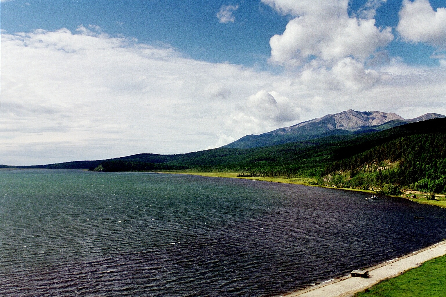 Baikalsee, Insel Swijatoj Nos (Heilige Nase)